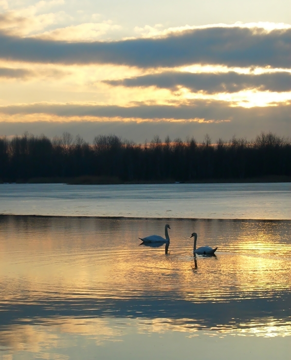 Jezioro Pogoria II zimowym wieczorem